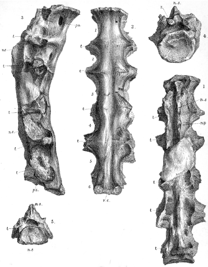 Ornithodesmus cluniculus sacrum in multiple views